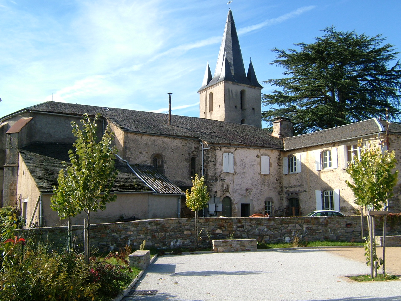 Le Masnau-Massuguiès, Tarn (France); église St.Paul et ancien presbytère.